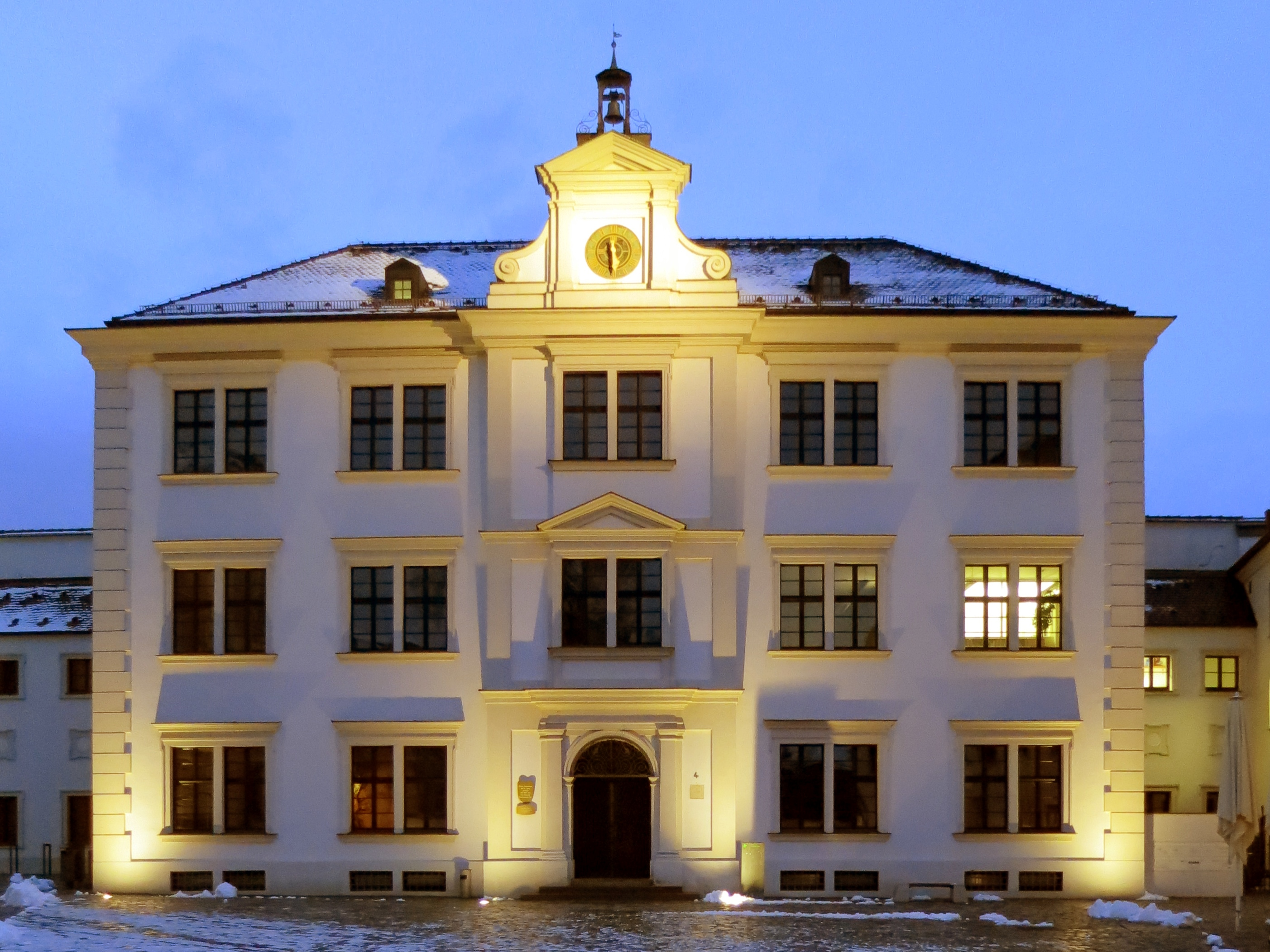 Anna Gymnasium Bau von Elias Holl Steht unter Denkmalschutz